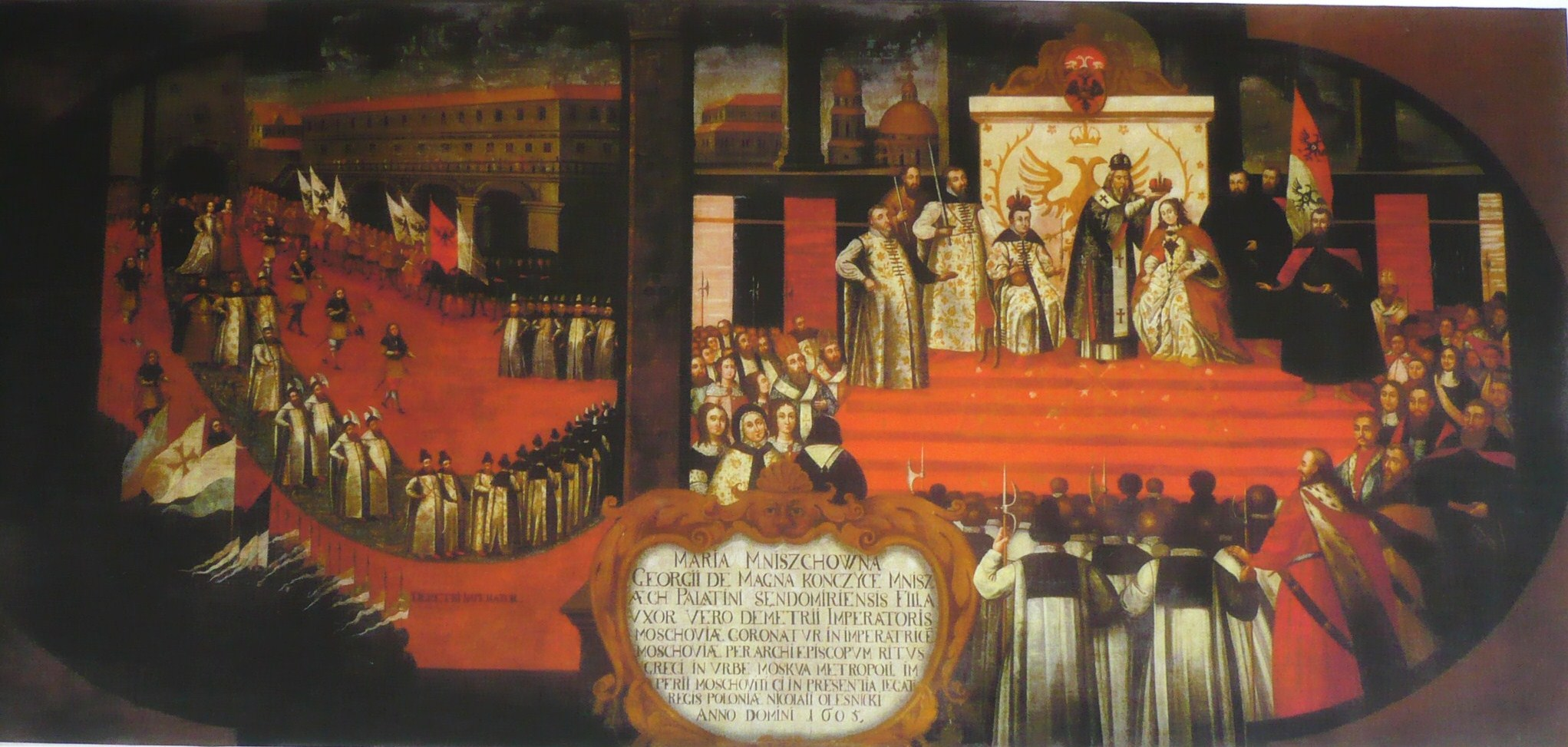 Wiśniowiec, obraz